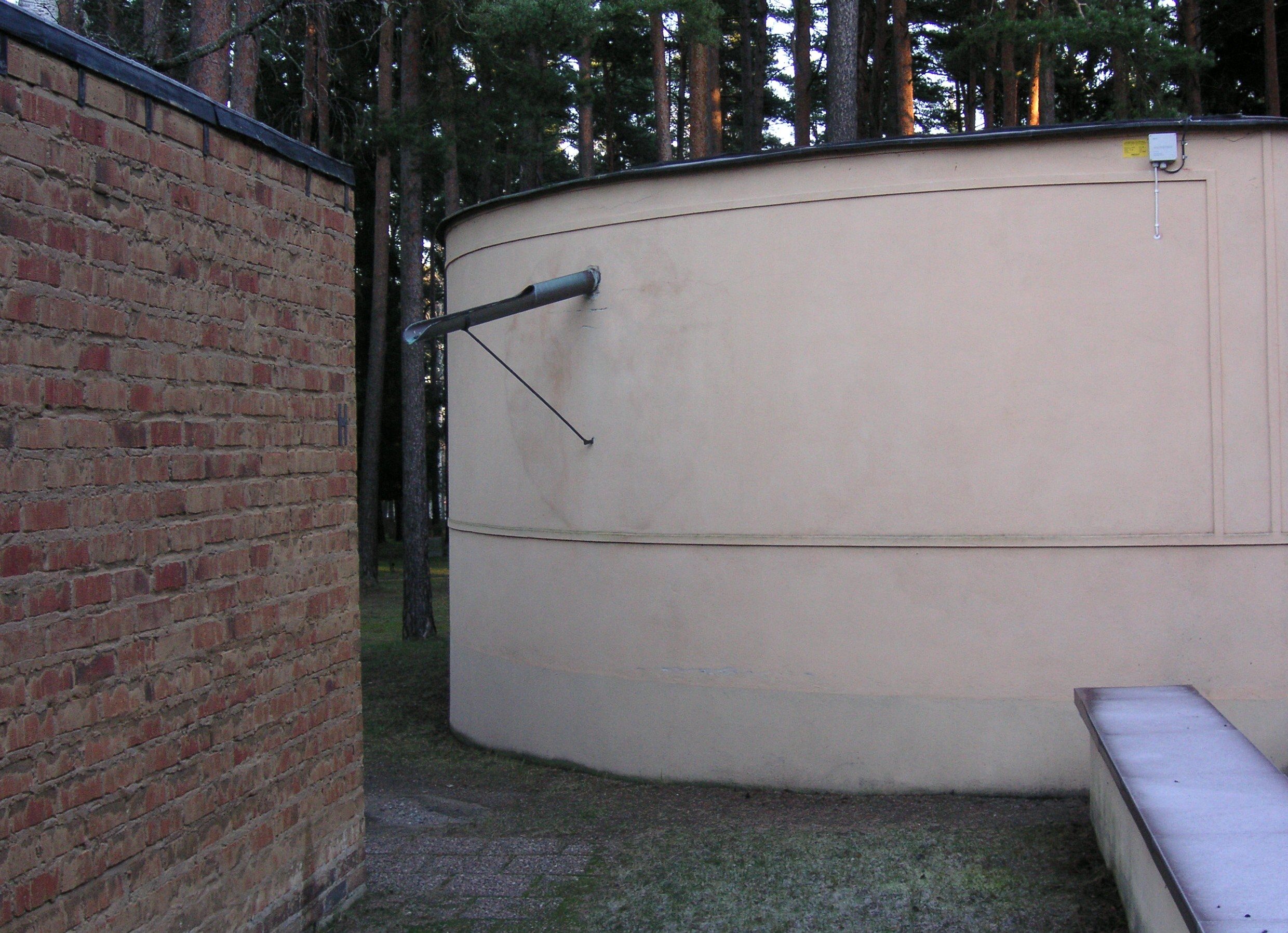 Uppståndelsekapellets förråd på Skogskyrkogården i Stockholm, detalj